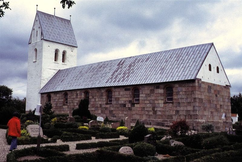 Tim Kirke i Danmark. Tim kirke